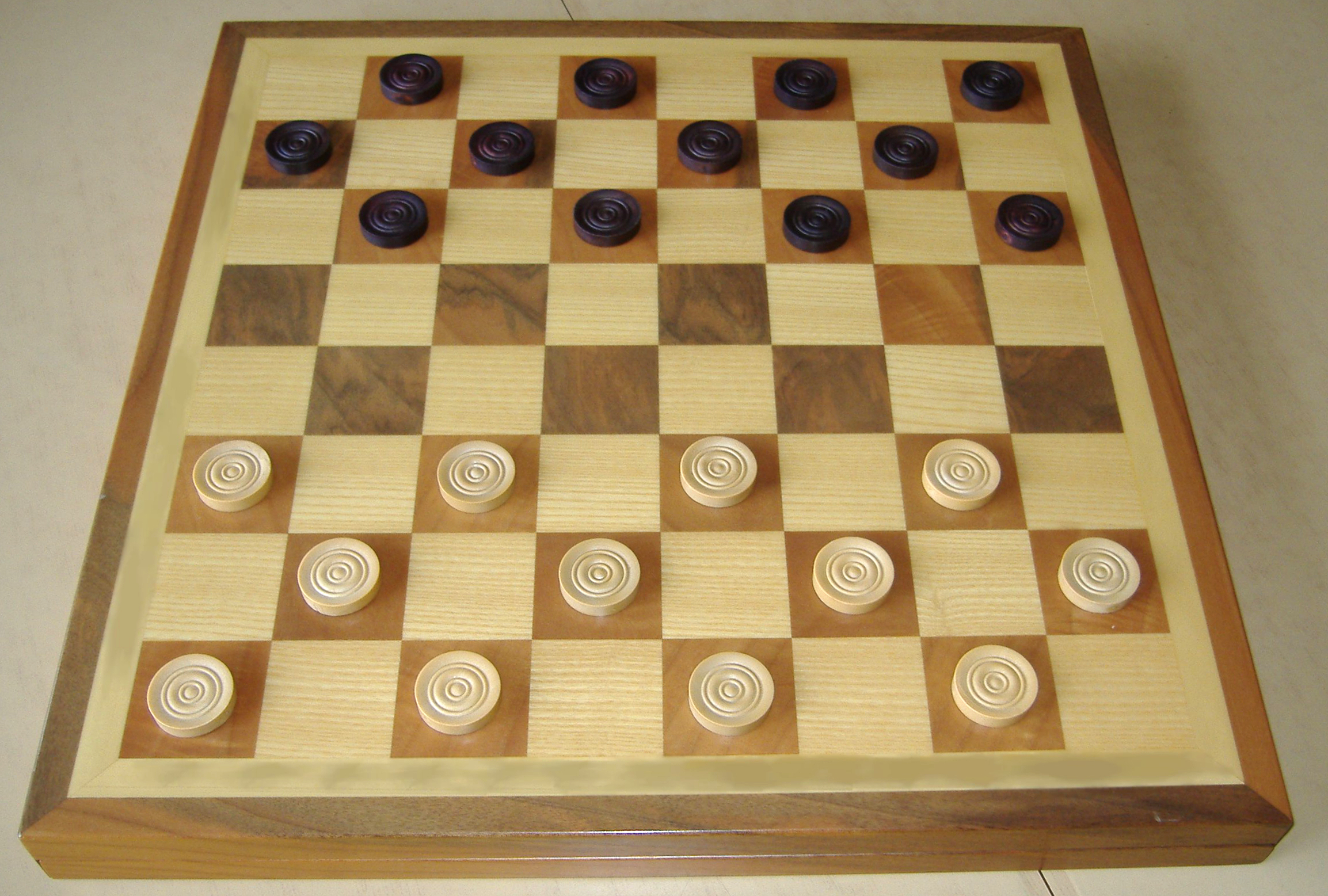 Damespiel korrekt (weißes Feld rechts unten)